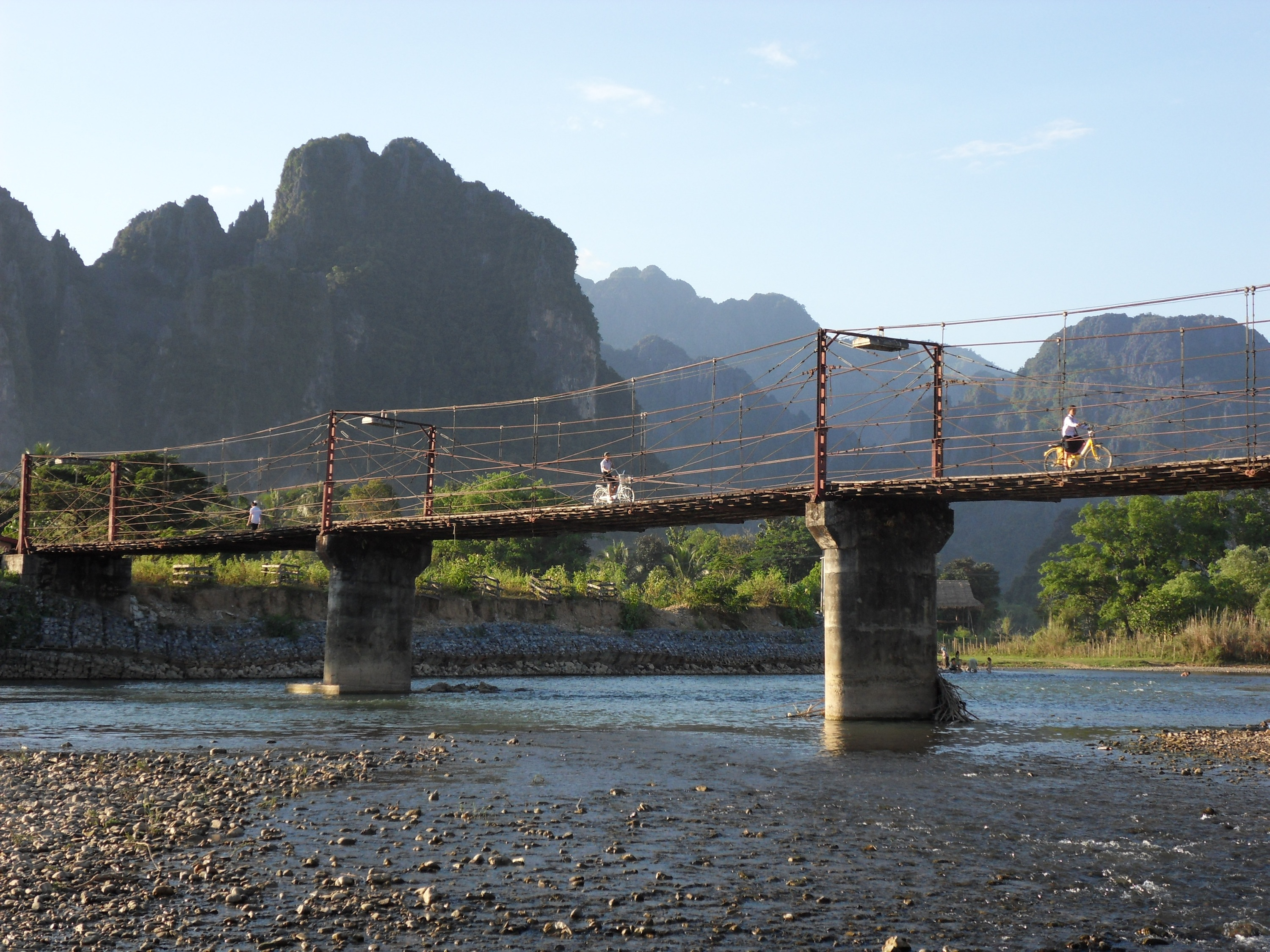 Pont sur la Nam Song à VangVieng, nov. 2011.